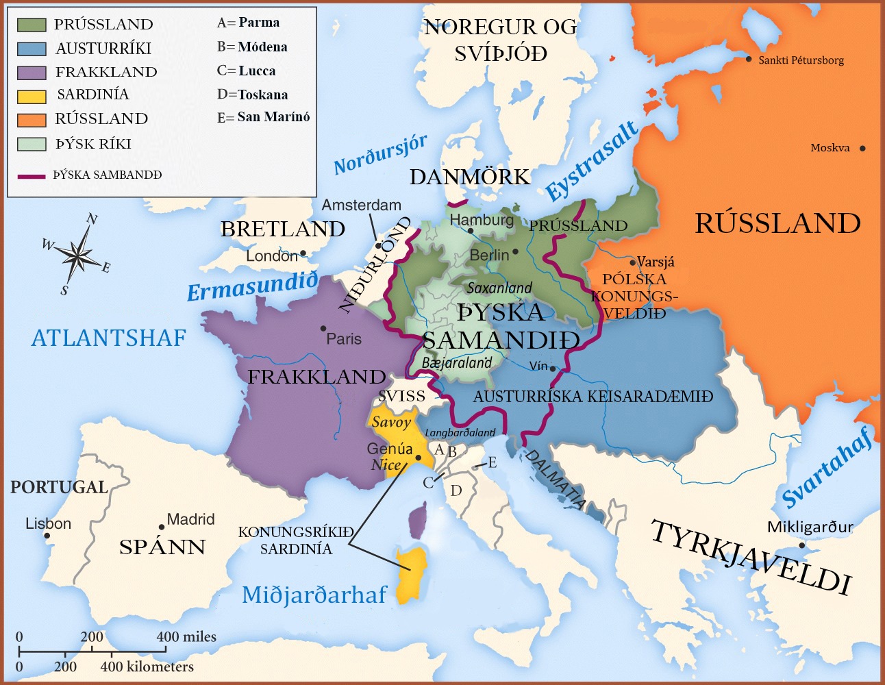 Kort yfir breytingar á korti Evrópu eftir Vínarfundinn árið 1814-1815.